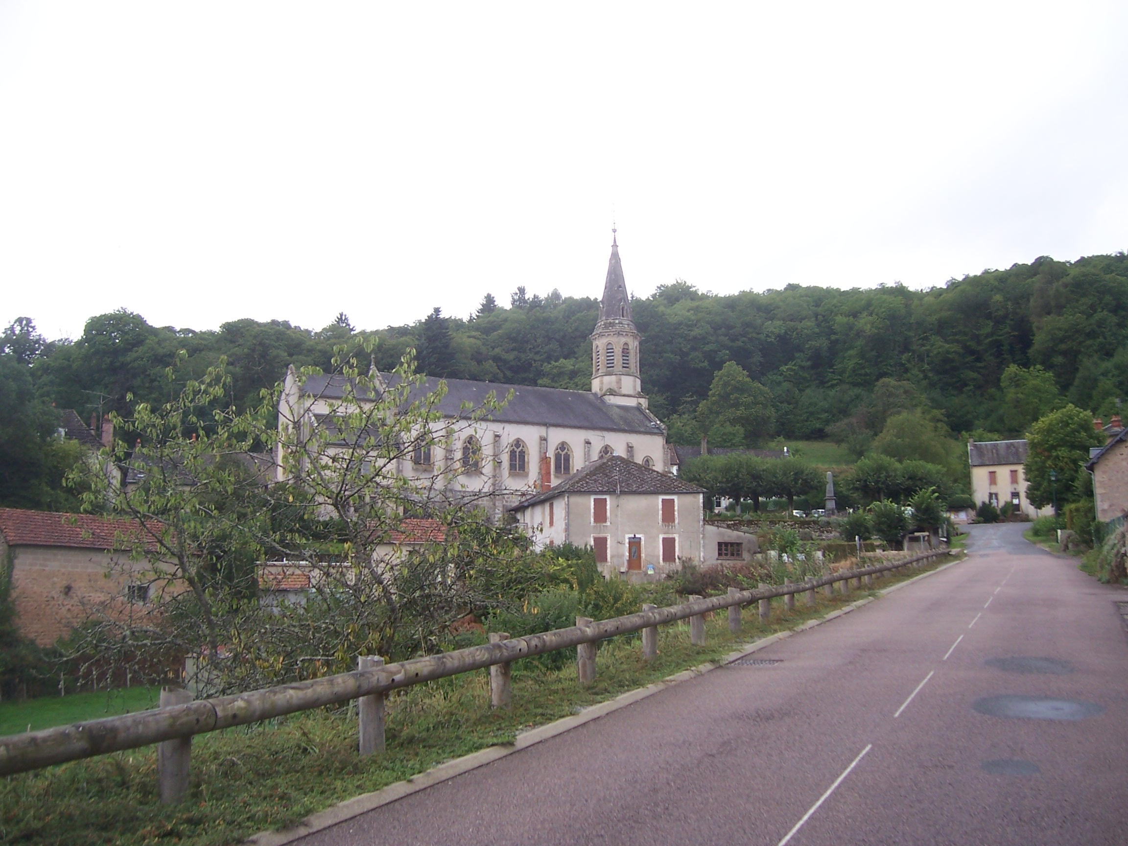 Eglise de La Comelle